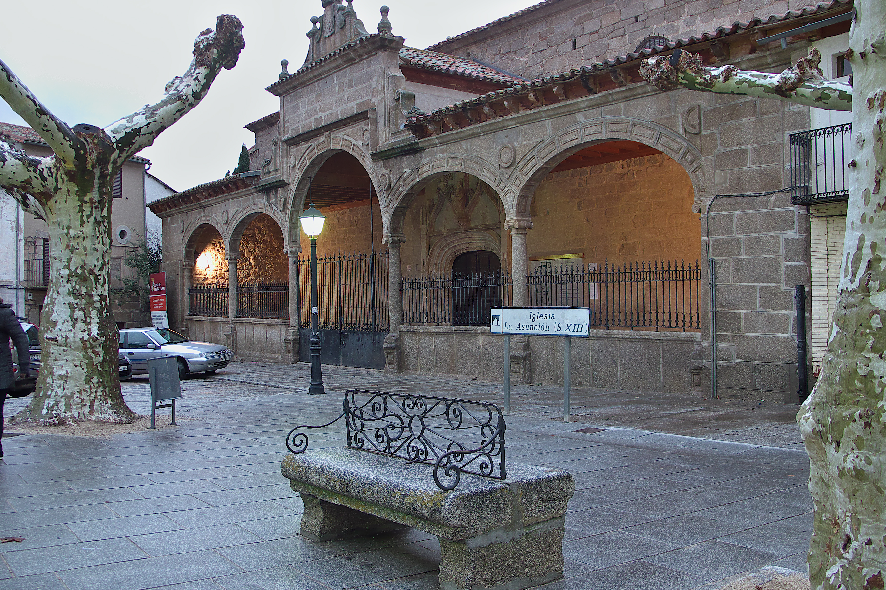 Pórtico renacentista (s. XVI)